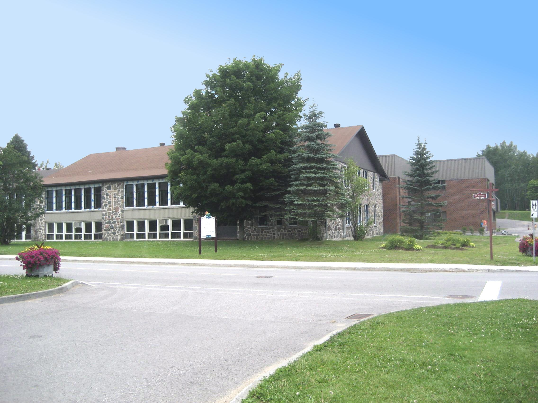 Ecole Harfang-des-Neiges à Stoneham Qc Canada